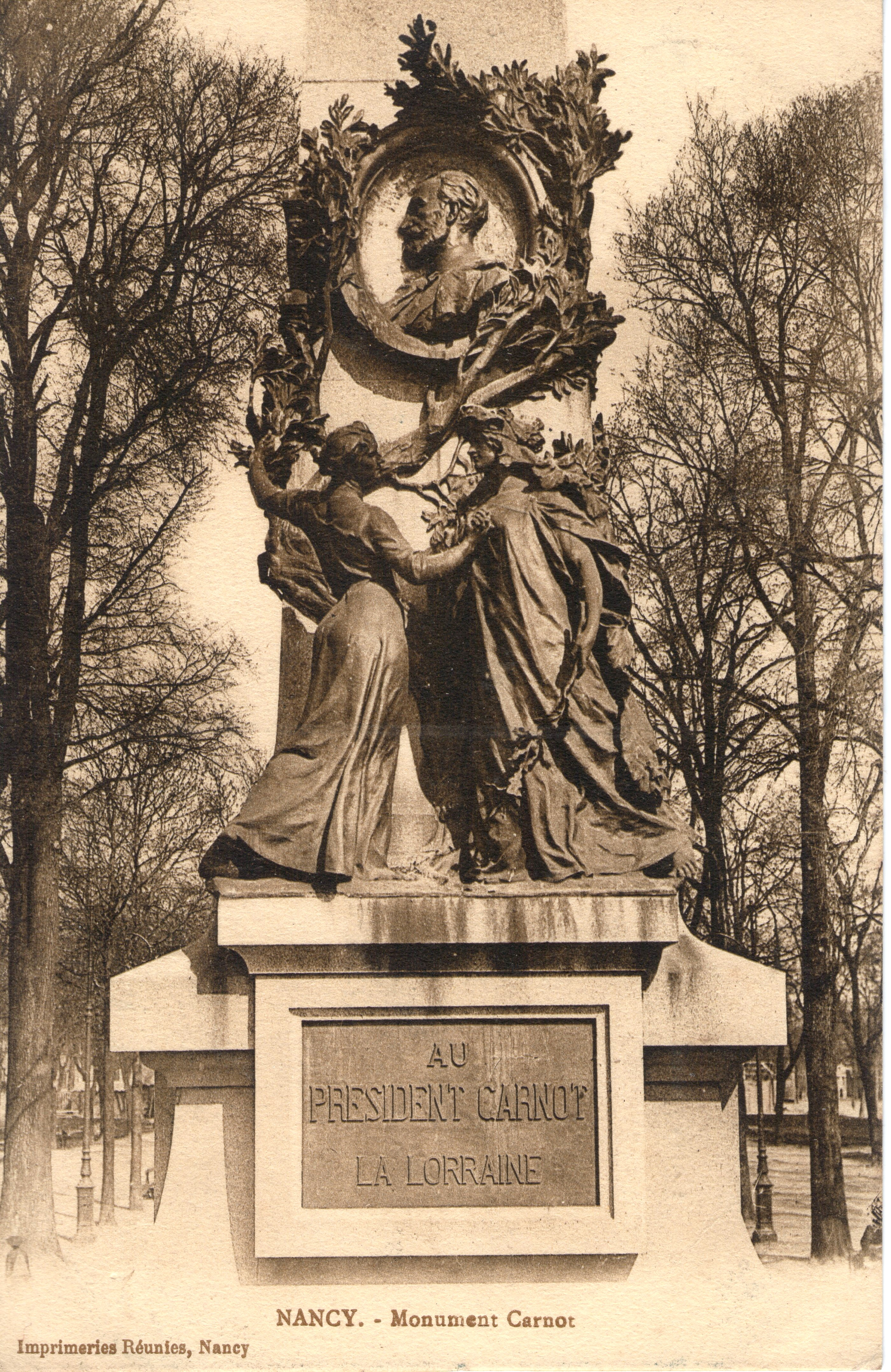 Obelisk Nancy